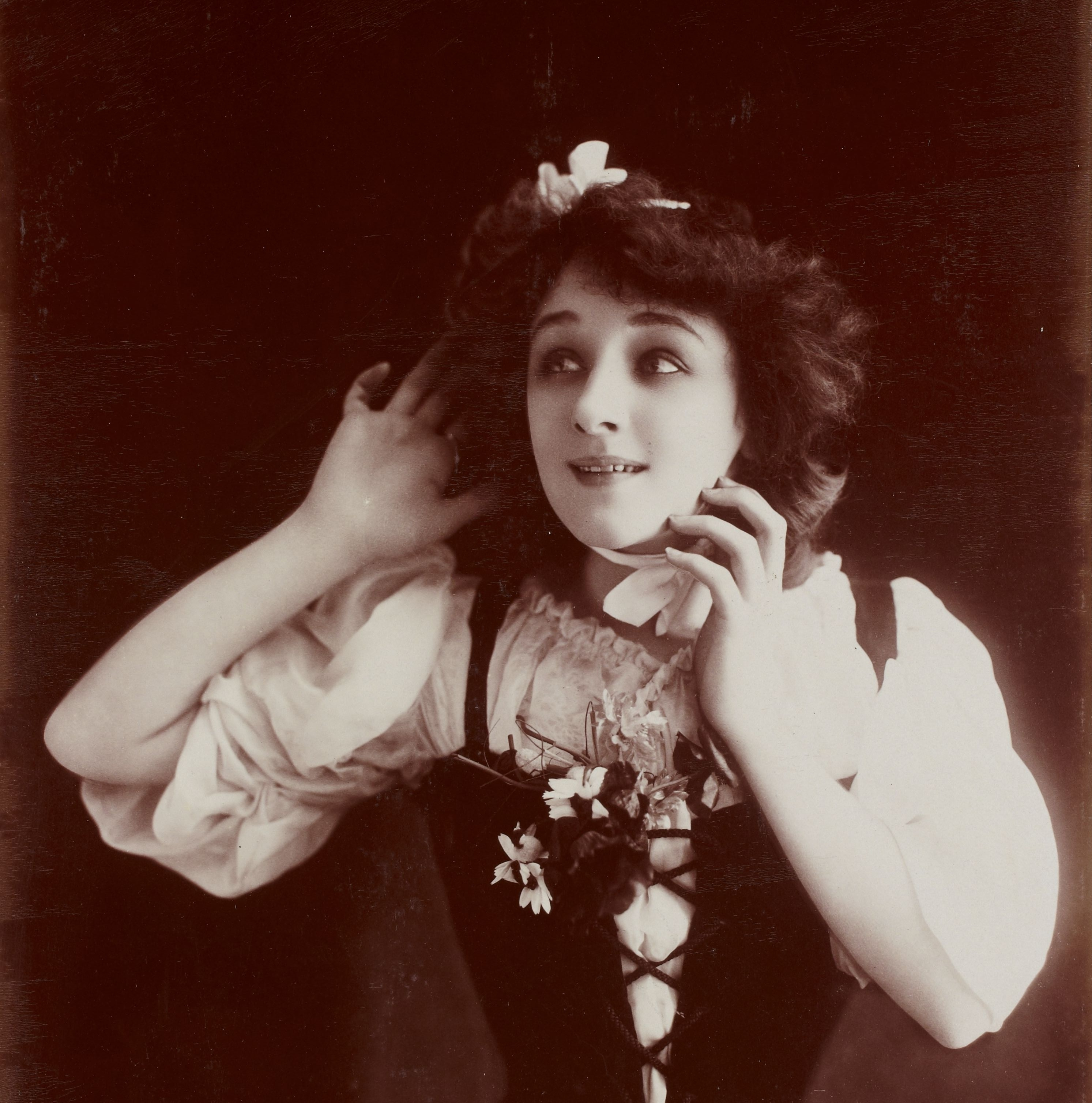 Album Reutlinger de portraits divers, vol. 47 : [photographie positive] : Berthe Bovy.